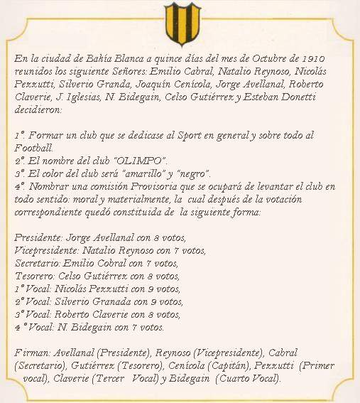 acta